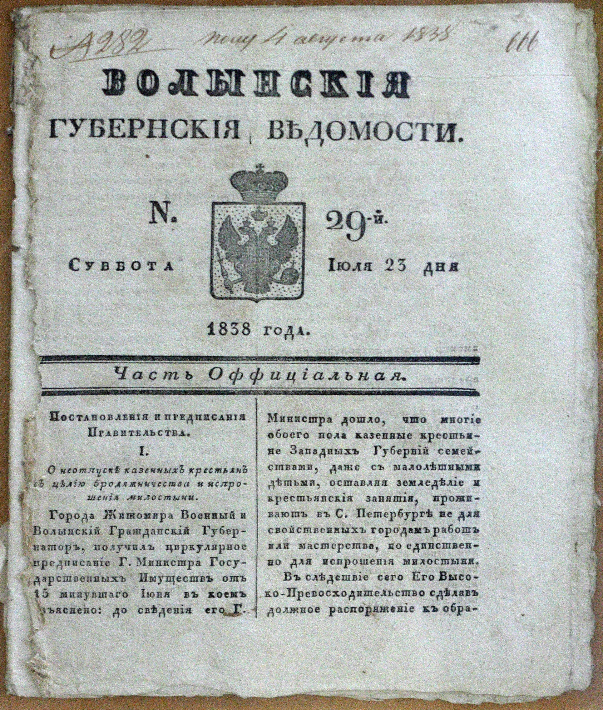 Первая страница газеты «Волынские губернские ведомости» за 23 июля 1838 года